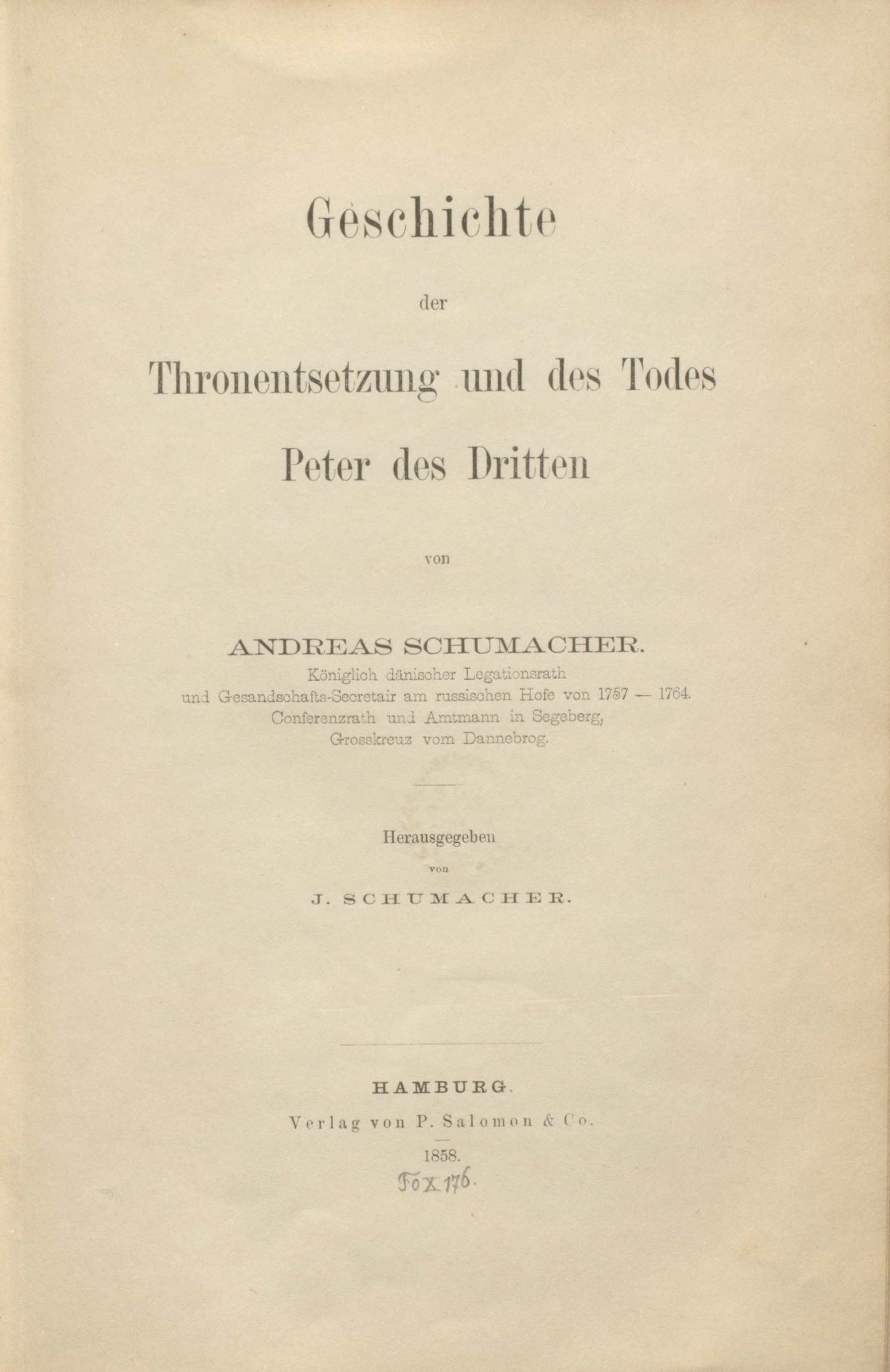 Johannes Schumacher (Hrsg.): Andreas Schumacher: Geschichte der Thronentsetzung und des Todes Peter des Dritten. Vorwort mit biografischen Angaben. Hamburg: P. Salomon, 1858 Titelblatt